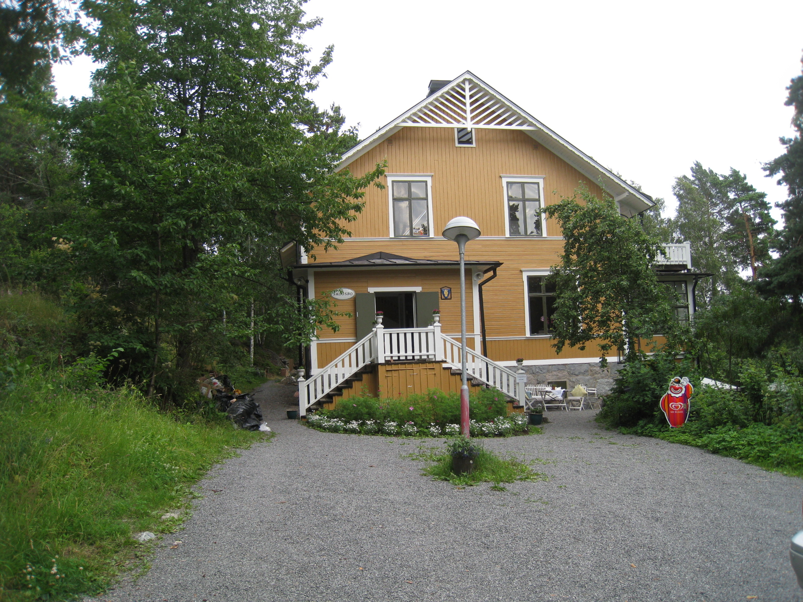 "Villa Skogsbo" i Ålstensskogen inom Smedslättens område, Bromma, byggd av stadsingenjören Herman Ygberg 1911.